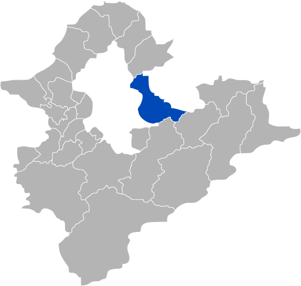 KaurJmeb為編寫臺灣省臺北縣汐止市，於2005年2月6日所繪。